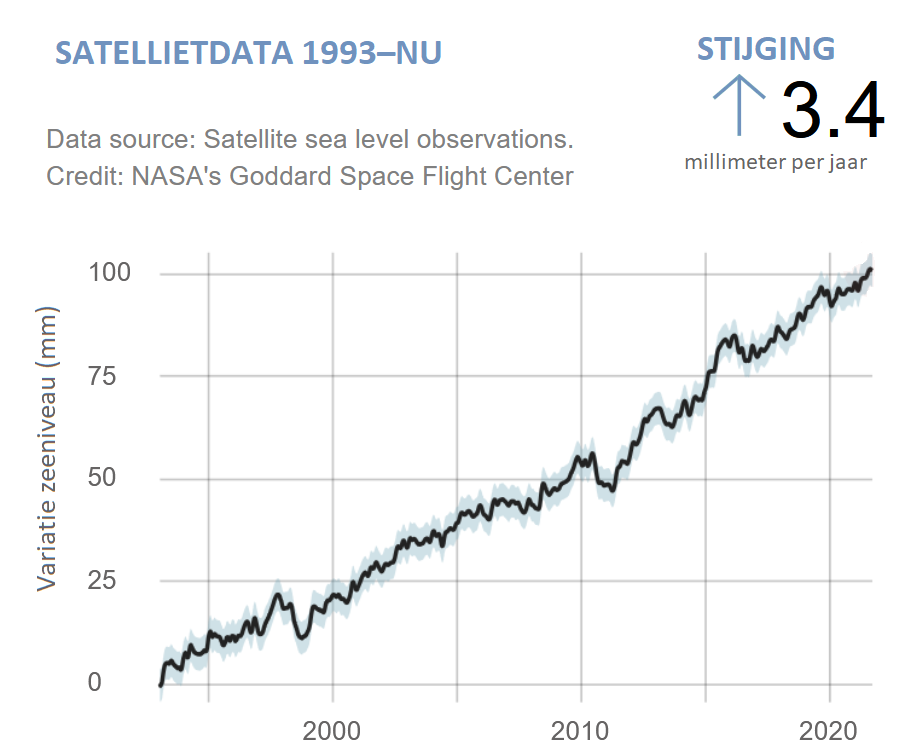 Zeespiegelstijging zoals gemeten door verschillende satellieten